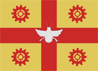 Bandeira do município paulista de Iracemápolis